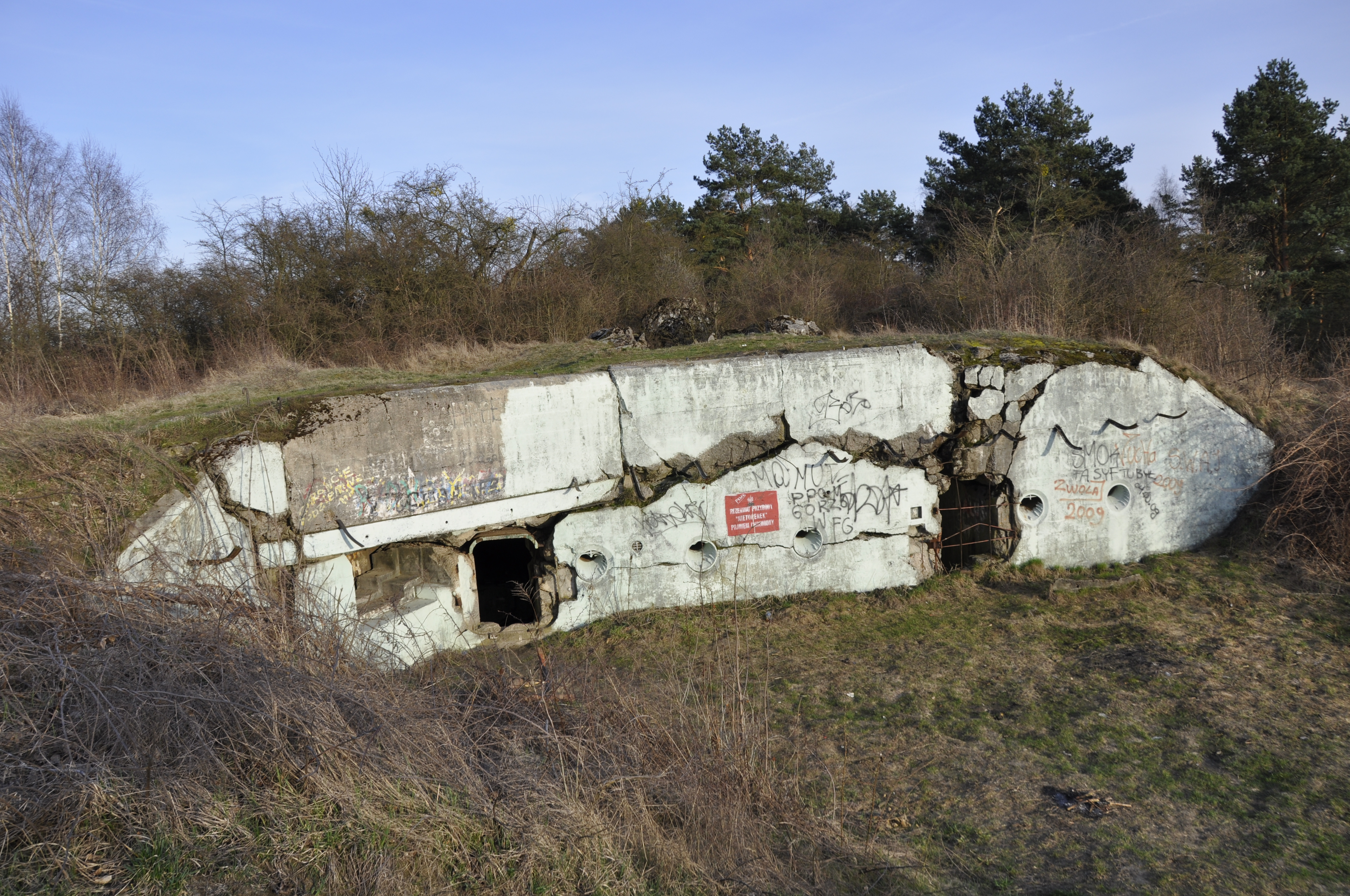 Panzerwerk, Ostwall, Polen